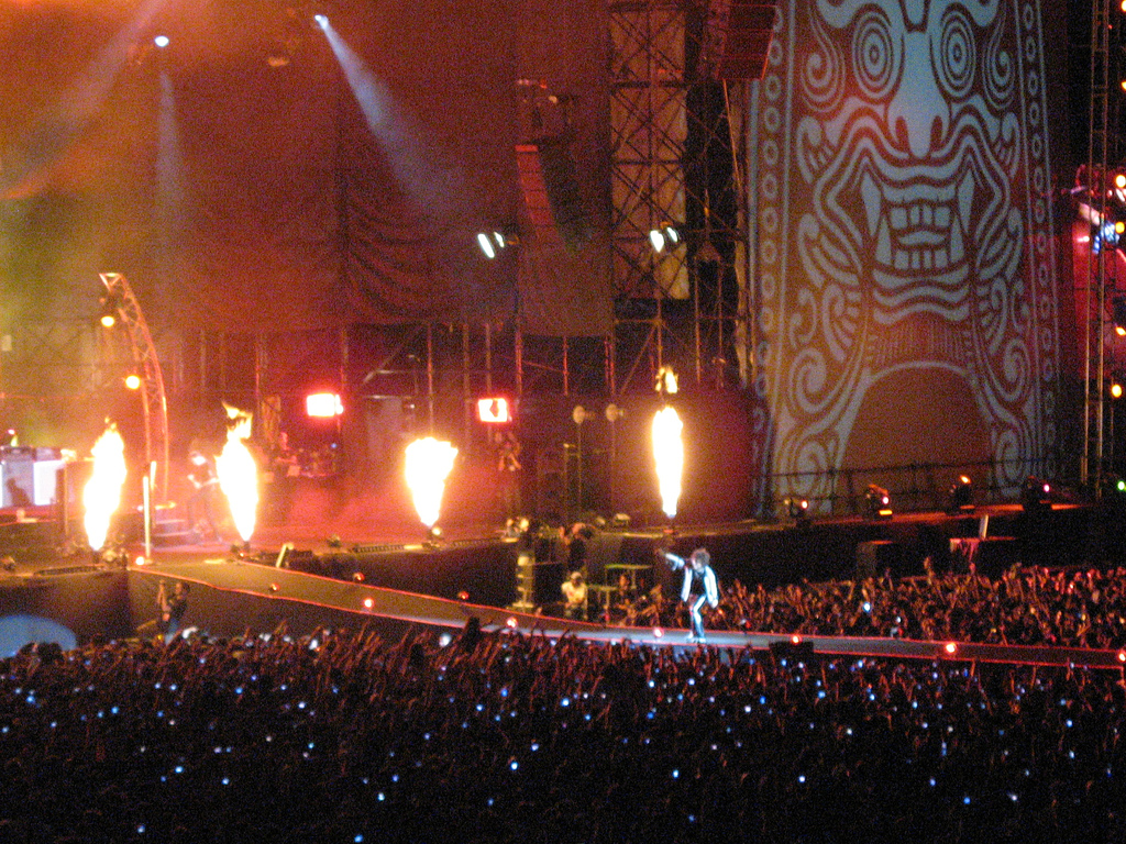 Avalancha fue la cancion que mas disfrute, en un concierto del que no esperaba mucho pero del que salí gratamente sorprendido gracias a la fuerza de la música y la letra de las canciones de un grupo que no necesita de mucho show en su concierto, a diferencia de lo que sería alguien como Robbie Williams, que fue el último concierto al que fuí y con el que ademas de disfrutar la música disfrutas todo el show que trae alrededor.